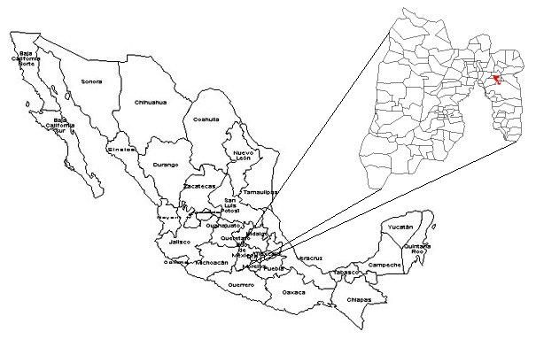 Localización en la republica mexicana del municipio de Chiconcuac